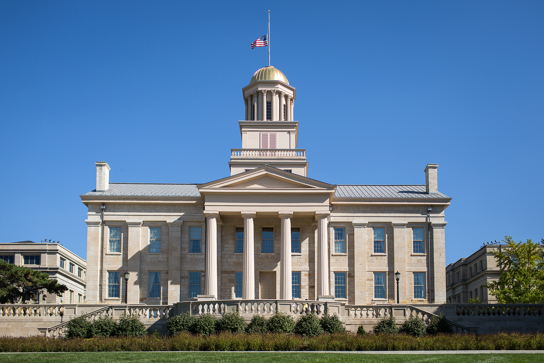 Старый капитолий, Айова-Сити